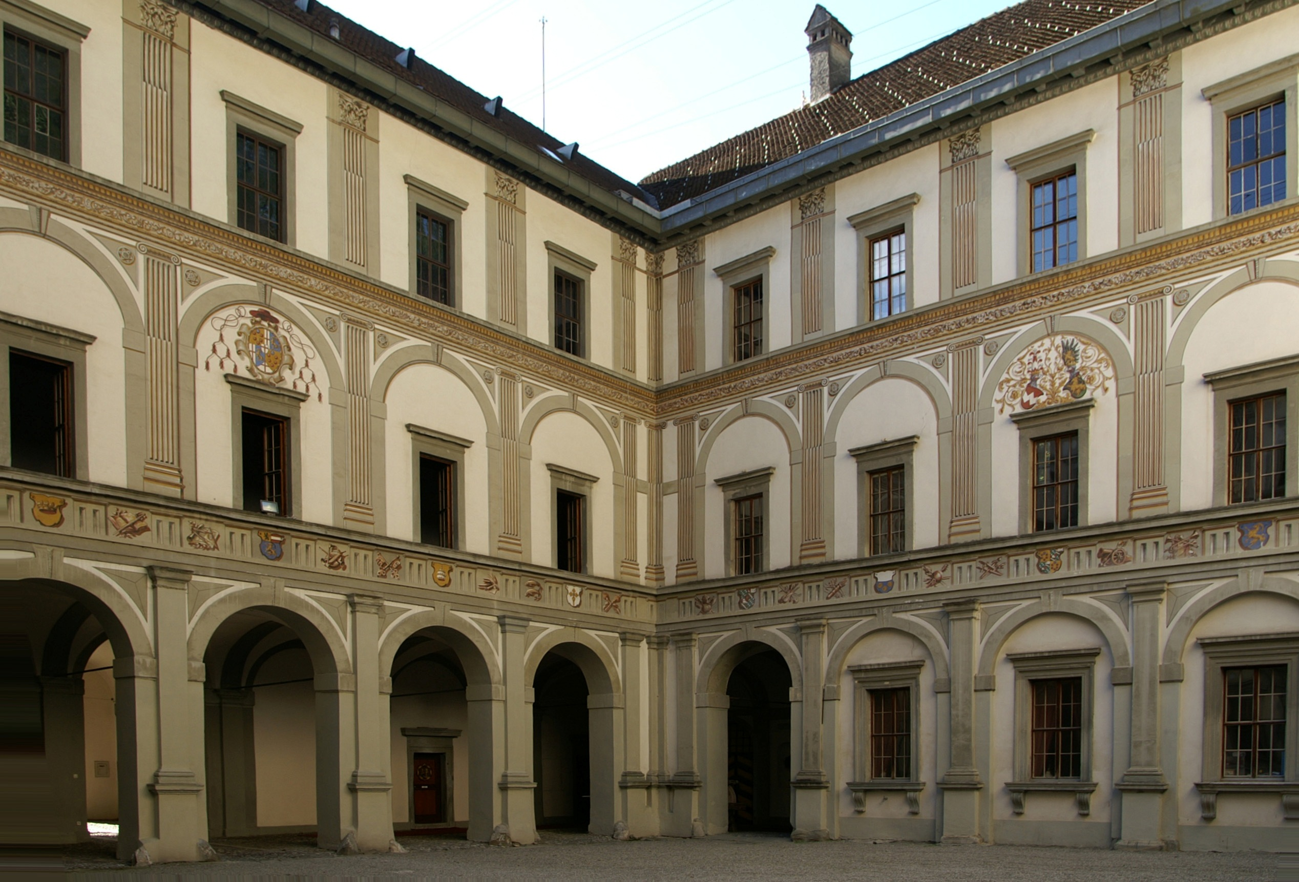 Palast Hohenems Innenhof , Renaissancepalast 1563 erbaut, Fundort des Nibelungenliedes in Vorarlberg